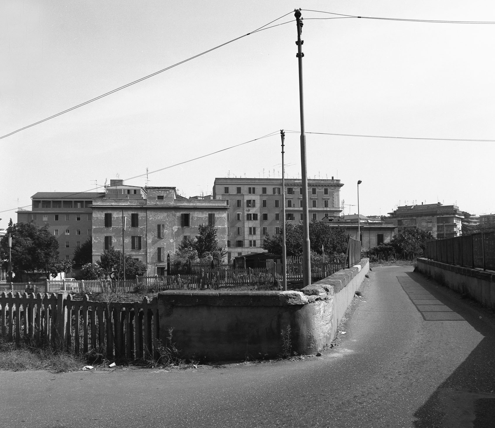 Via Casilina vecchia Roma 1982